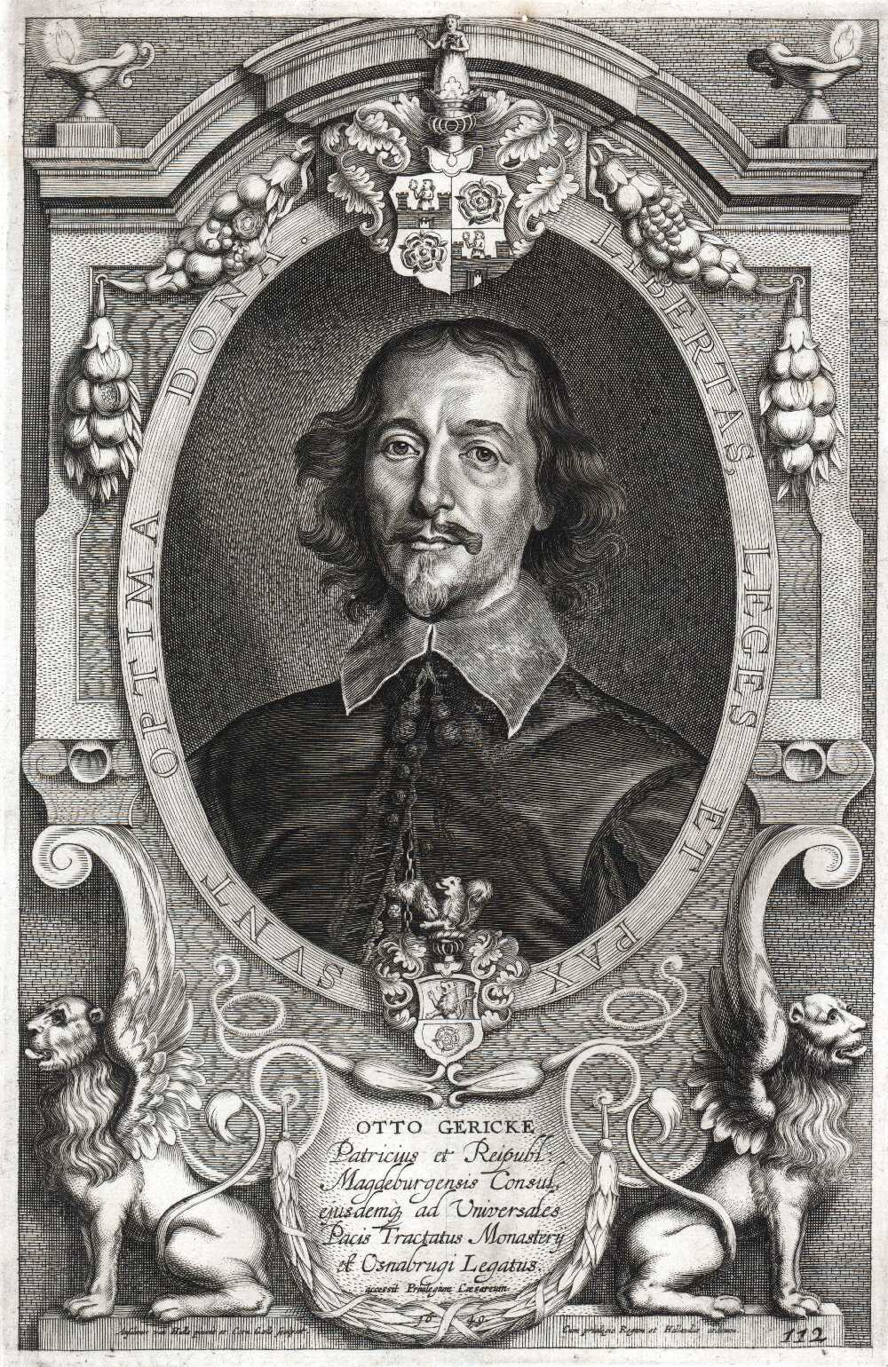 Otto von Guericke